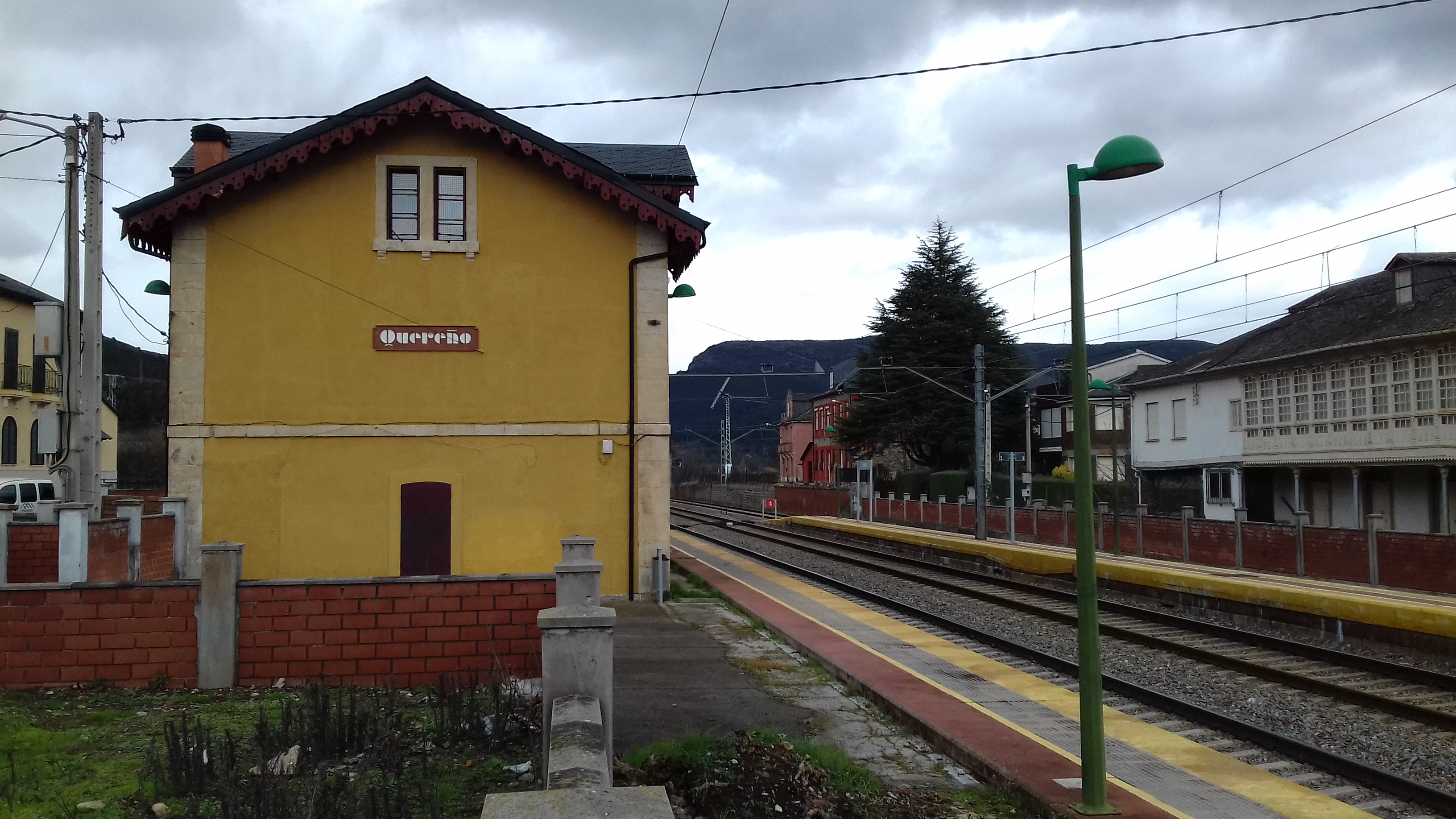 Estación de trens de Quereño, Rubiá